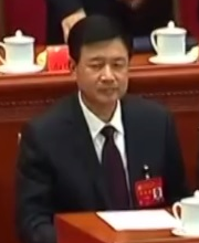 王小洪，中共十九届中央委员，公安部常务副部长，摄于十九大期间